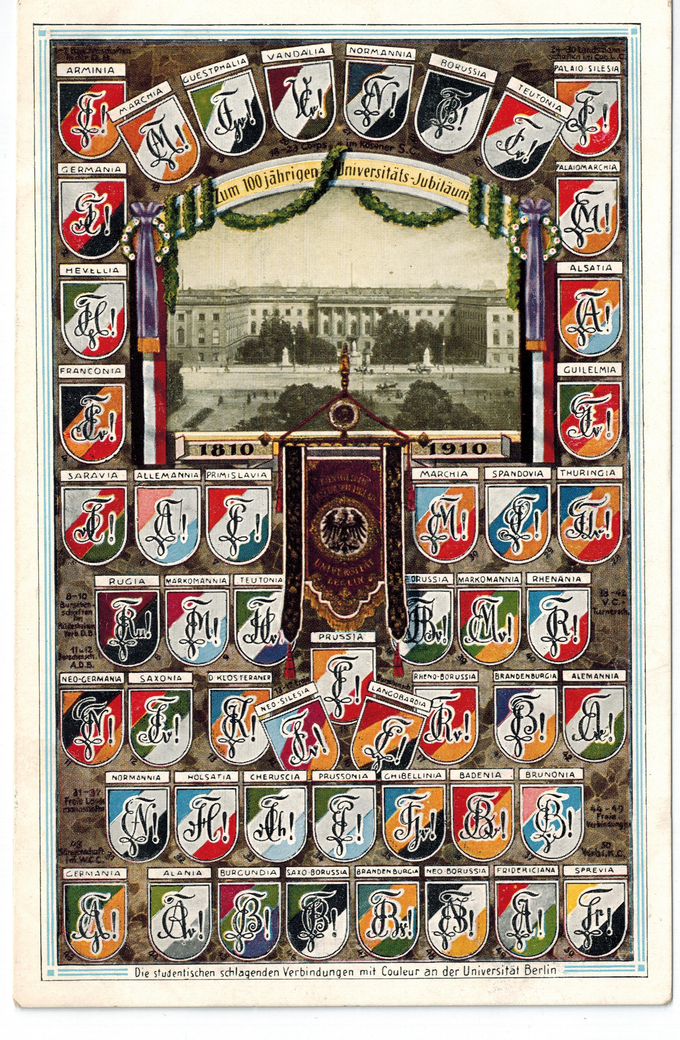 Farben und Zirkel der Berliner Korporationen 1910